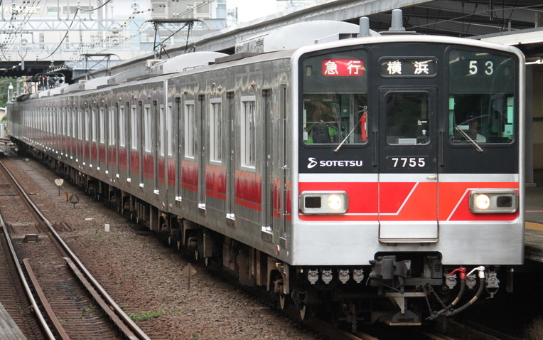 new7000